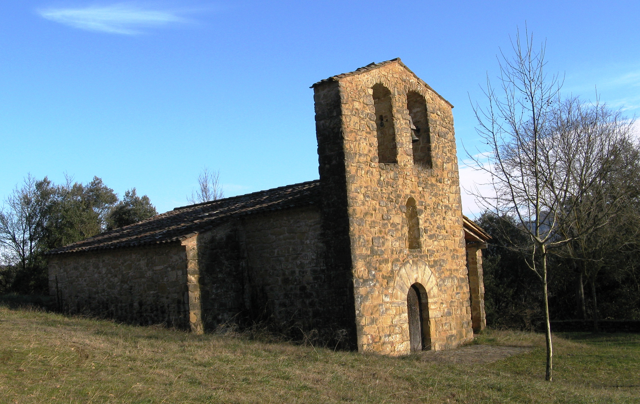 Romanische Kirche „Sant Joan dels Balbs“ (Einsiedelei) im „Val de Bas“, nahe der Ortschaft „La Pinya“, Katalonien, Spanien)